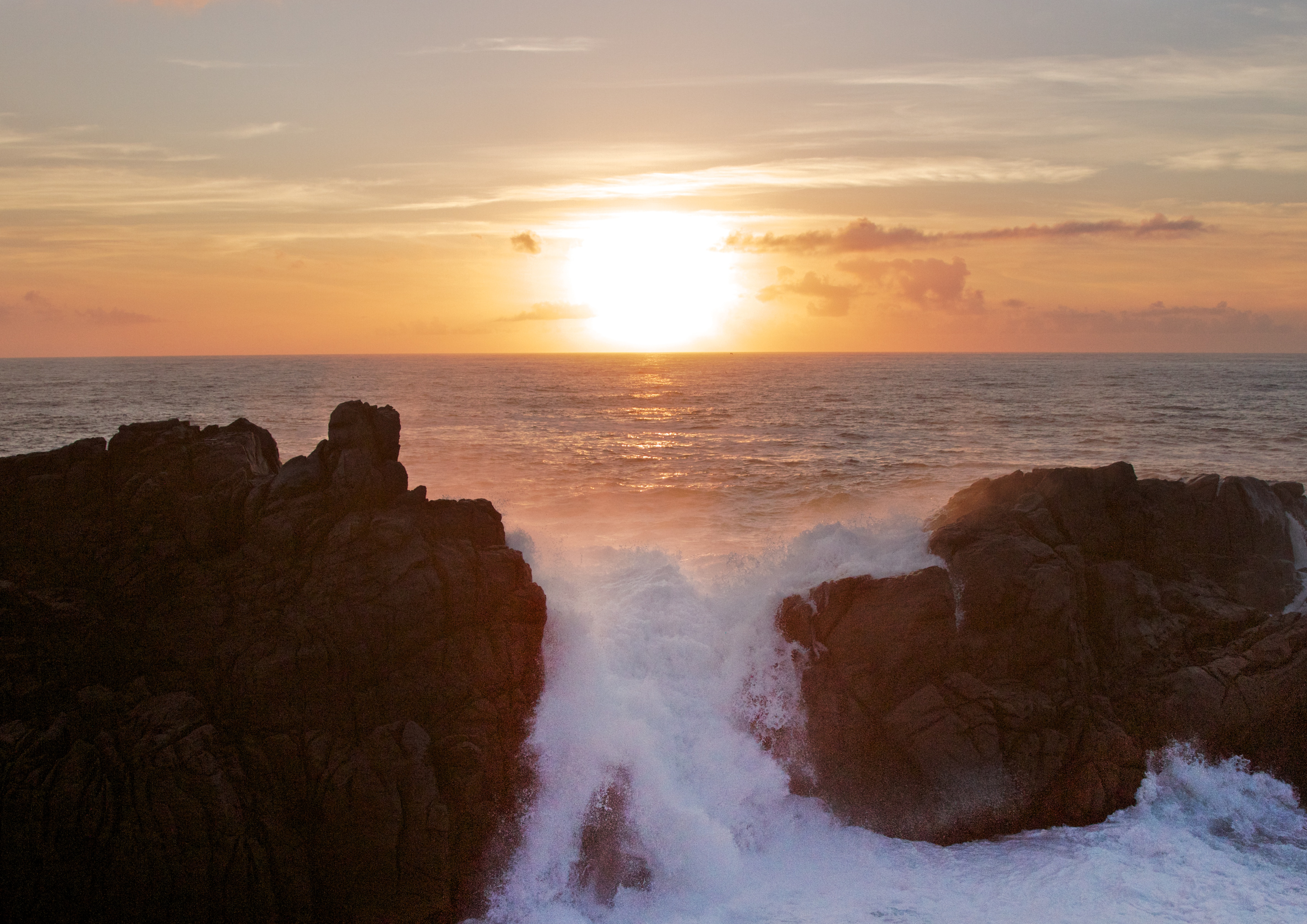 Ola rompiendo en las rocas de Cabo Touriñán, Costa da Morte This is a photography of a Special Area of Conservation in Spain with the ID: ES1110005. Natura2000 entry, EEA entry